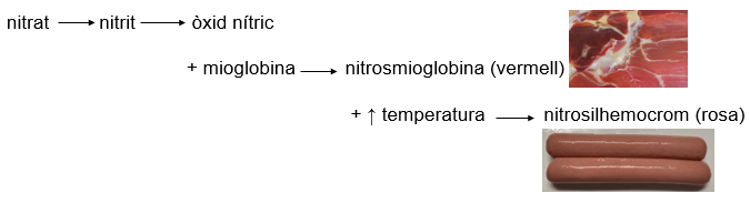 Mecanisme d’acció simplificat de la formació de color curat